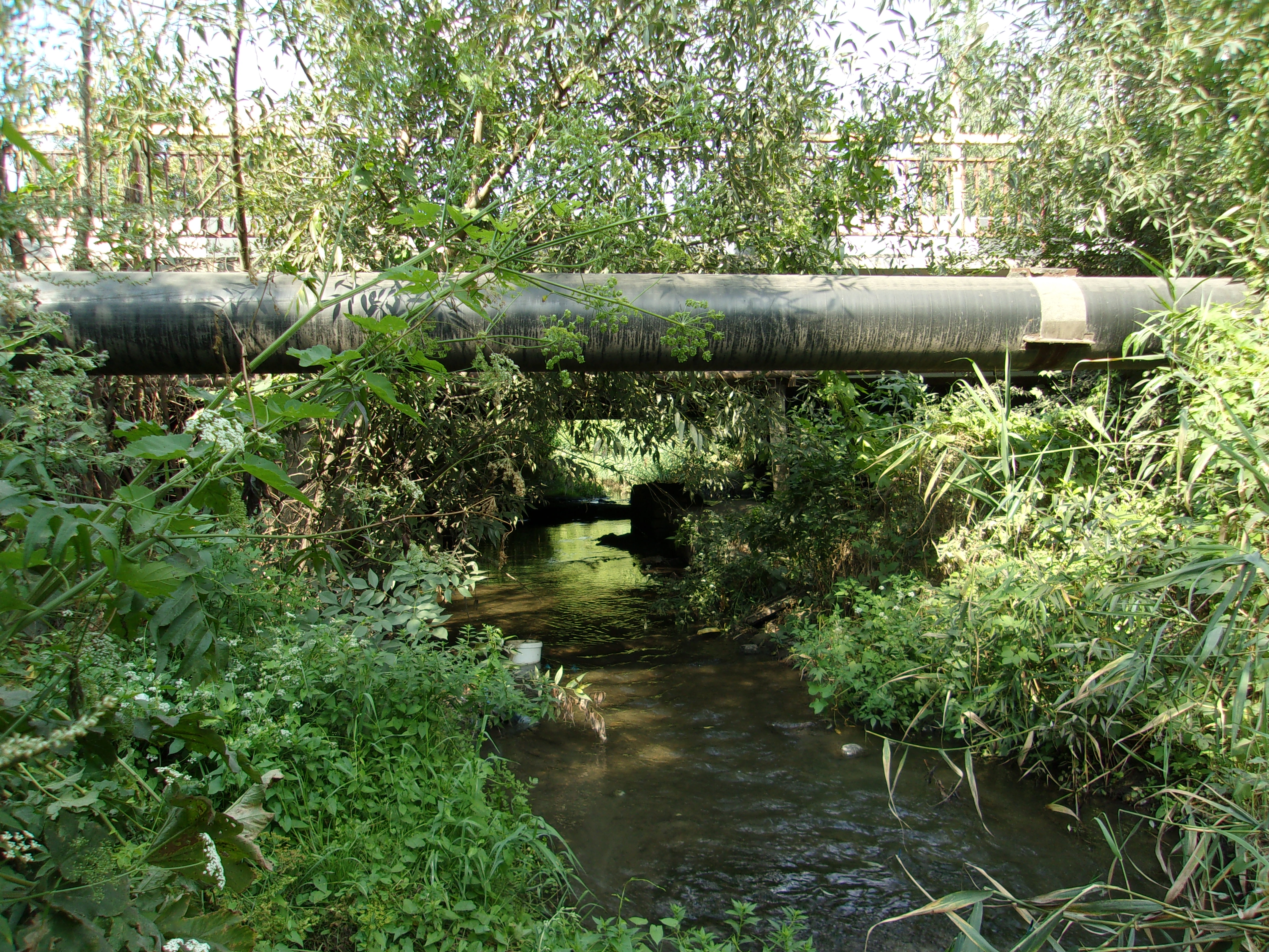 Грушевский мост, г. Шахты, вид с запада. Здесь 24 декабря 1978 года было обнаружено тело первой жертвы Андрея Чикатило — 9-летней Елены Закотновой.